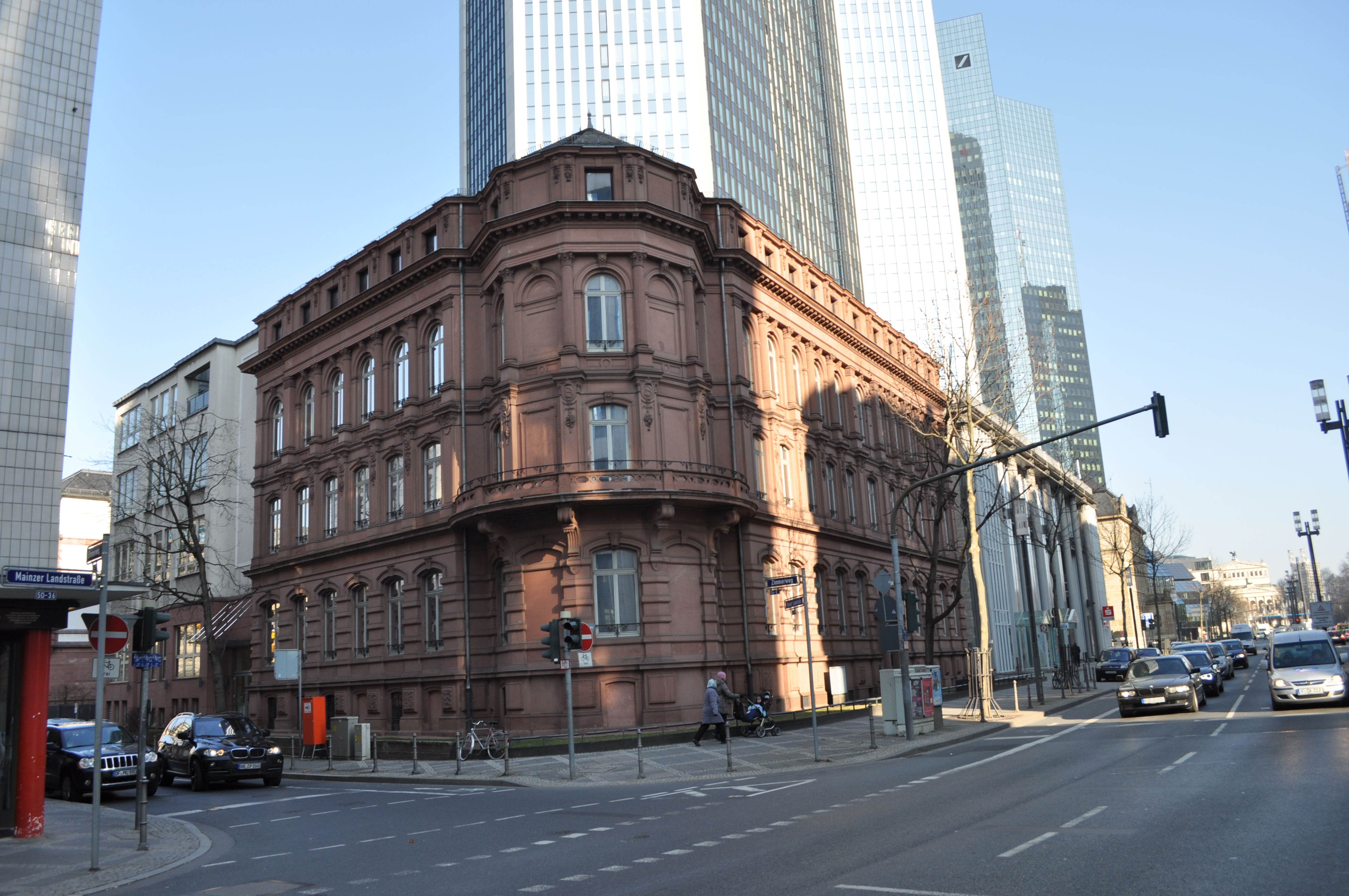 Denkmalgeschütztes Haus Zimmerweg 2 / Mainzer Landstraße 28 in Frankfurt, Villa H. Seligmann. Erbaut um 1870-1872 von einem Entwurf von W. Lönholdt für den Frankfurter Filialleiter der New Yorker Bank J. & W. Seligmann & Co. mit reich gegliederter Sandsteinfassade in Stilformen aus Spätklassizismus und Neurenaissance sowie geschossweise wechselnder Pilaster- und Säulenordnung; eingezogener Eckpavillon auf polygonalem Grundriss, der ehemals überkuppelt war. Das Gesamtbild des Gebäudes wurde durch Aufstockungen und Erweiterungen stark verändert. Vormals gehörte Grund und Boden der Frankfurter Patrizierin Clothilde Clara Alexandra Koch-Gontard (1813-1869), Tochter des Frankfurter Seidenhändlers Georg Ludwig Gontard (gen. Louis Gontard-Karcher, 1769-1839). Als Ehefrau des Konsuls für Großbritanien Robert Koch (1808-1856) führte sie 1848/49 als sog. Parlamentsmutter einen bekannten Salon für die Abgeordneten der Frankfurter Nationalversammlung.